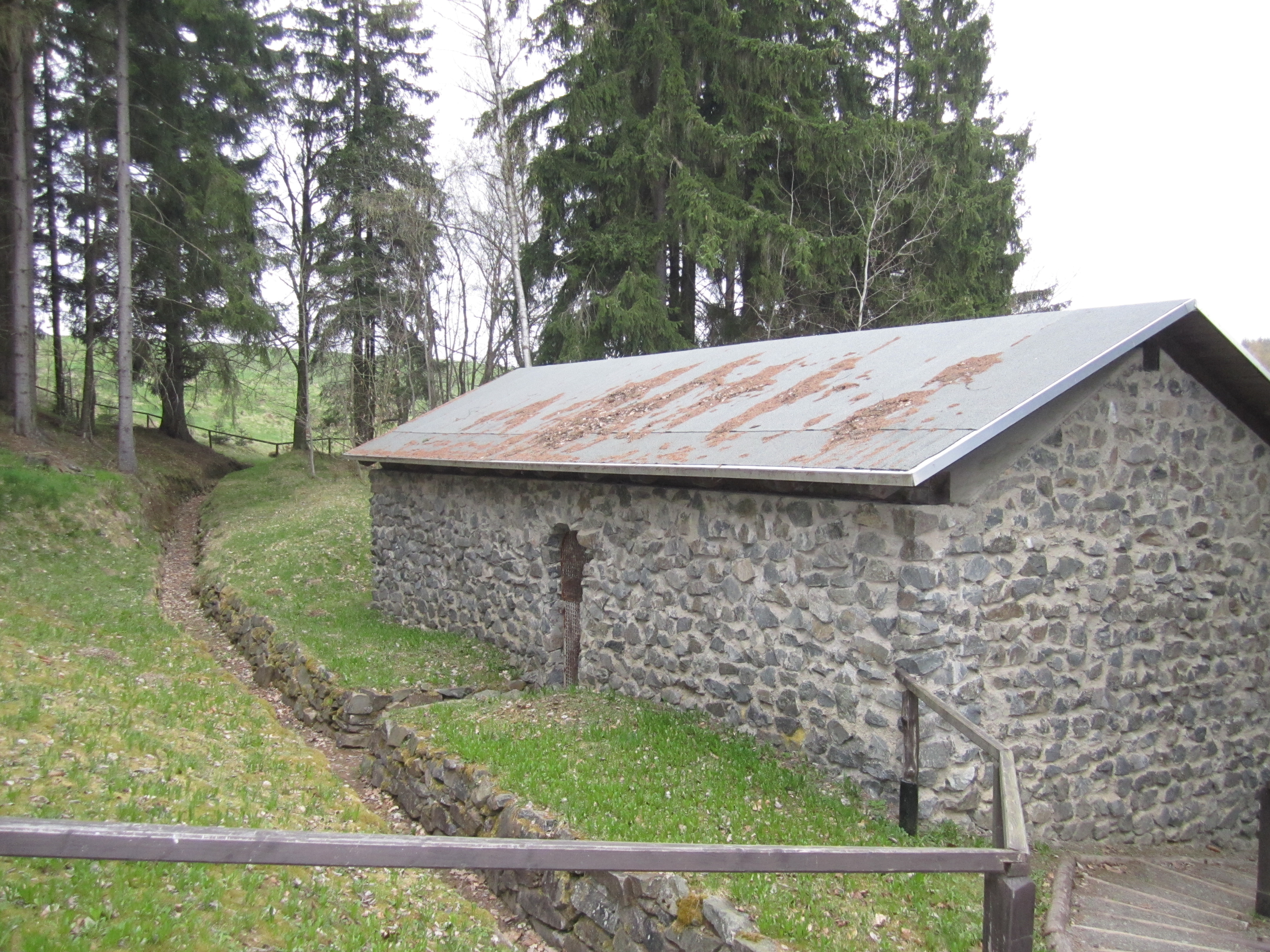 Die rekonstruierte übertägige Radstube der Grube Glasebach. Straßberg, Sachsen-Anhalt, Deutschland.